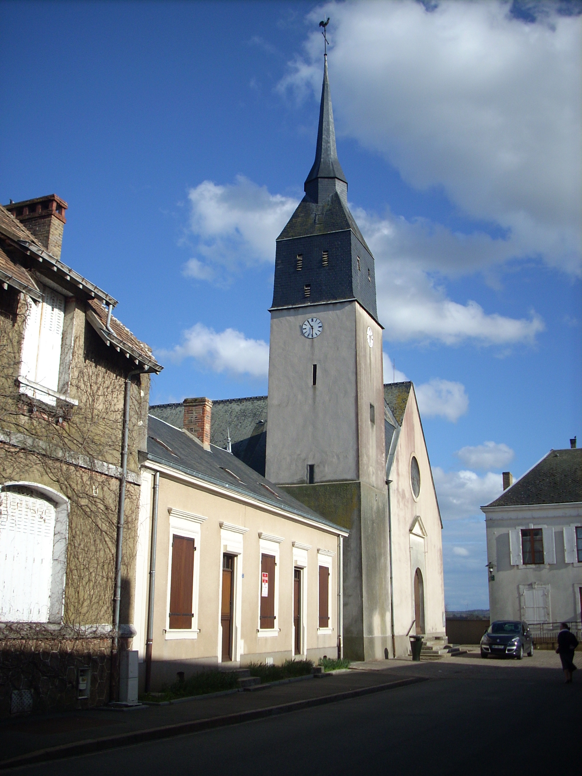 Eglise de Mulsanne